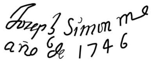 Firma del alfarero murciano José Simón Martínez, incisa en una tinaja fabricada en su taller de Totana (Murcia, España) en 1746.